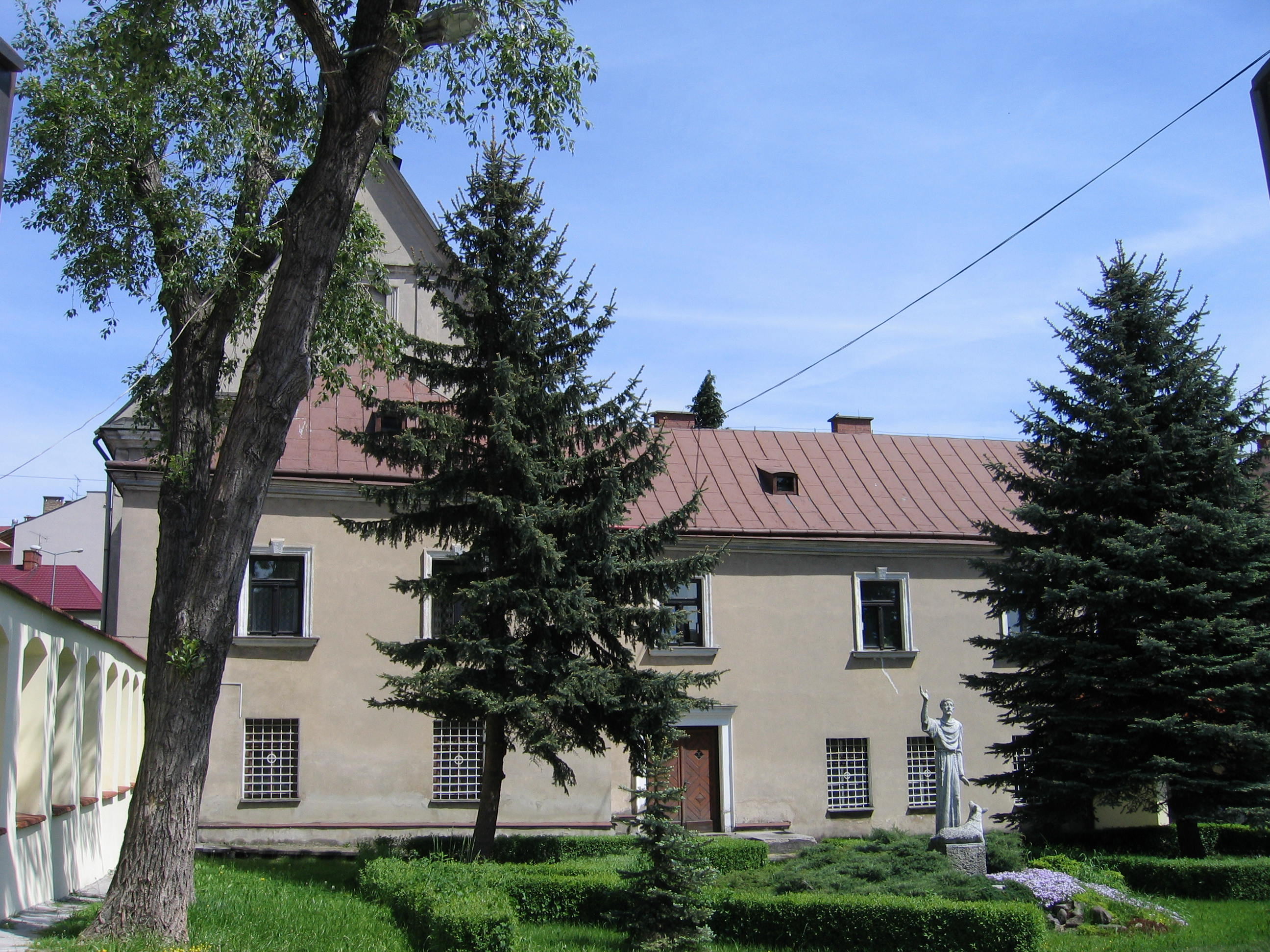 Ogród klasztoru bernardynów w Tarnowie (widok na kościół i zabudowania klasztorne)